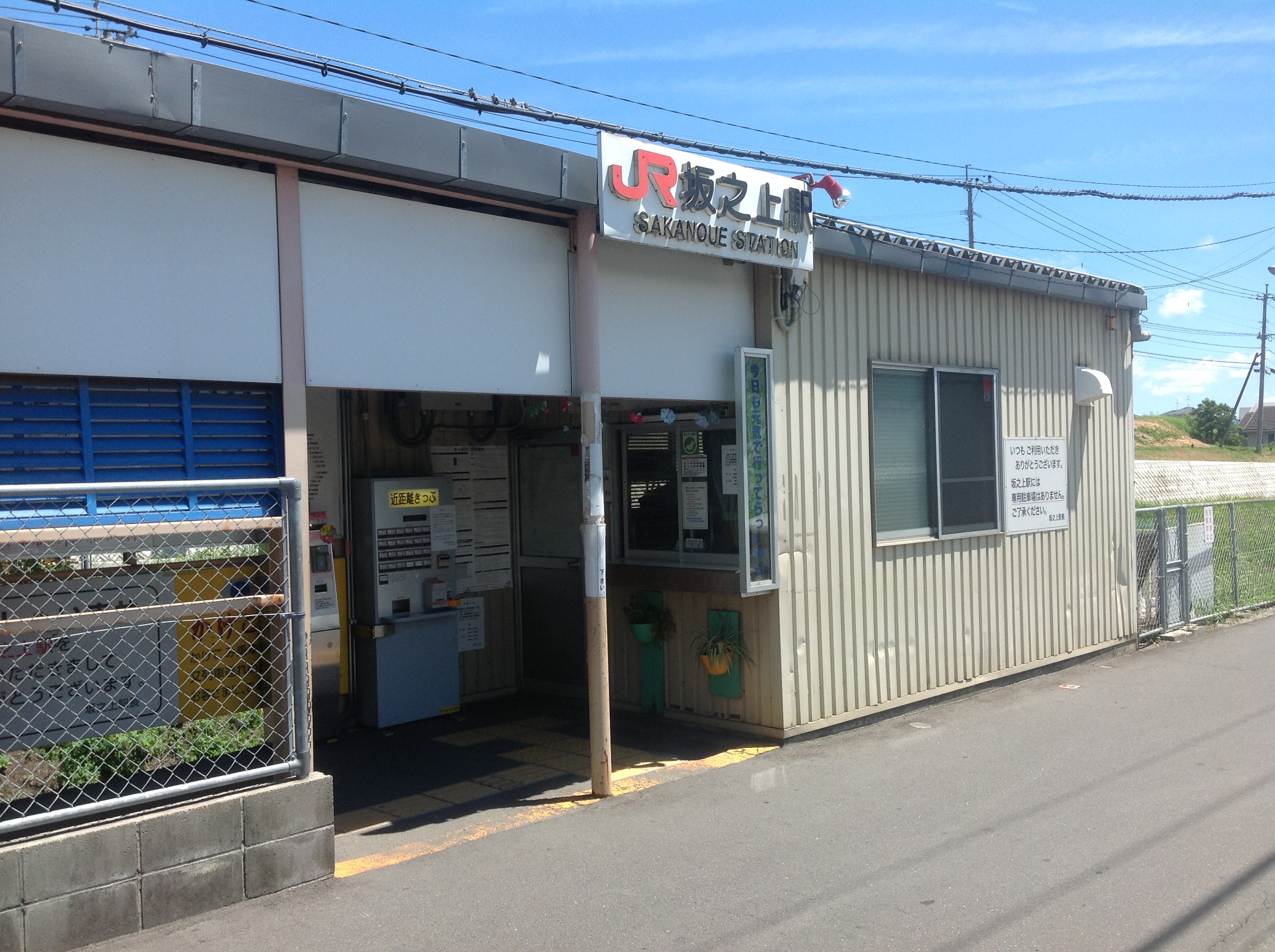 坂之上駅入り口